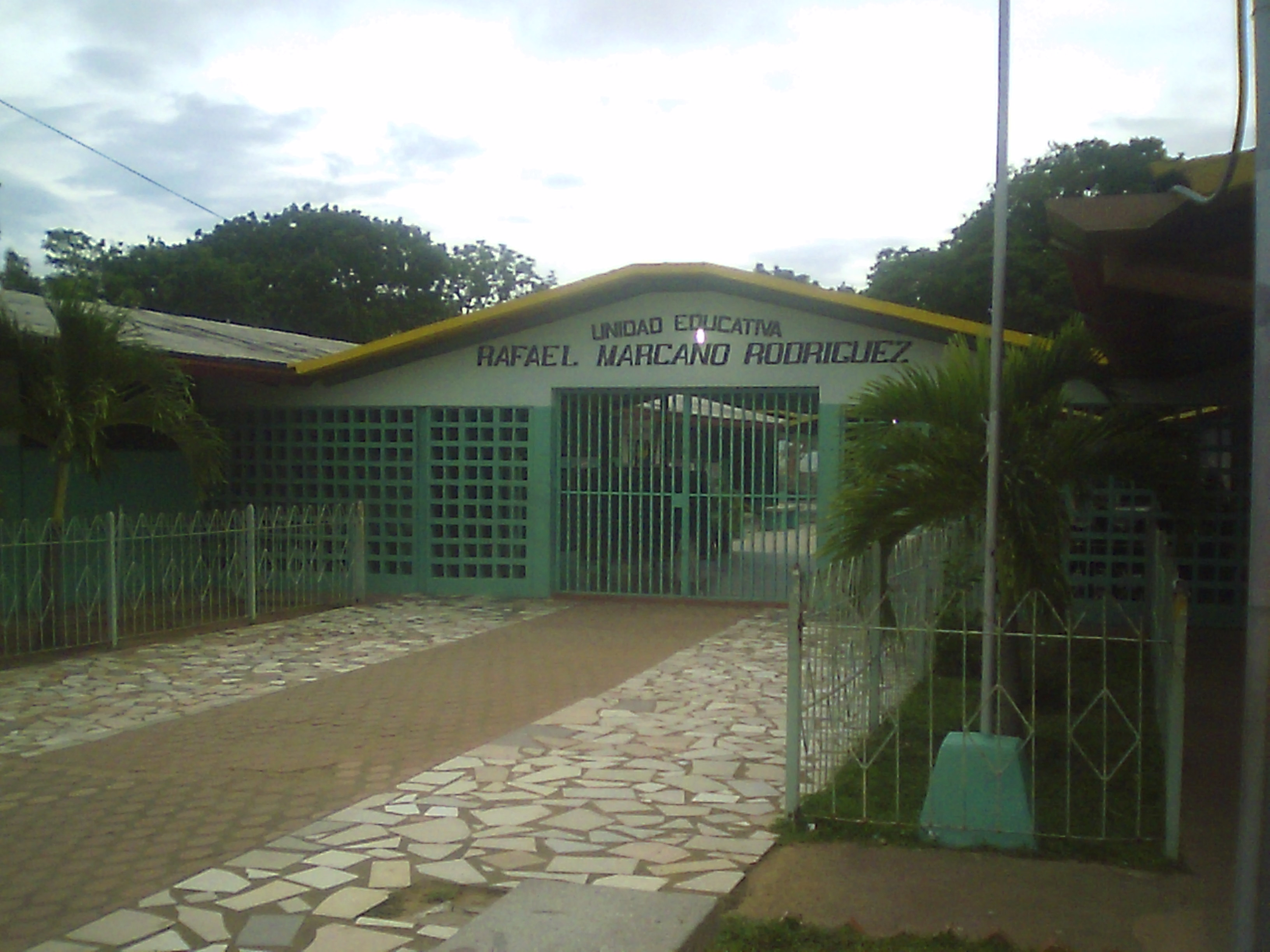 U.E.N. Rafael Marcano Rodriguez, institucion de mayor edad en San José de Guanipa, fundada en 1948